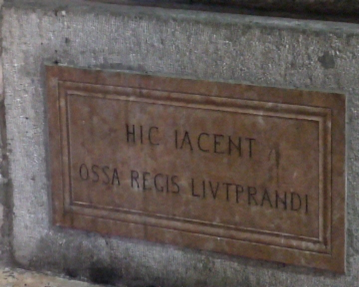 Pavia, San Pietro in Ciel d'Oro, Grabmal des Langobardenkönigs Luitprand, (Bild aus Video)